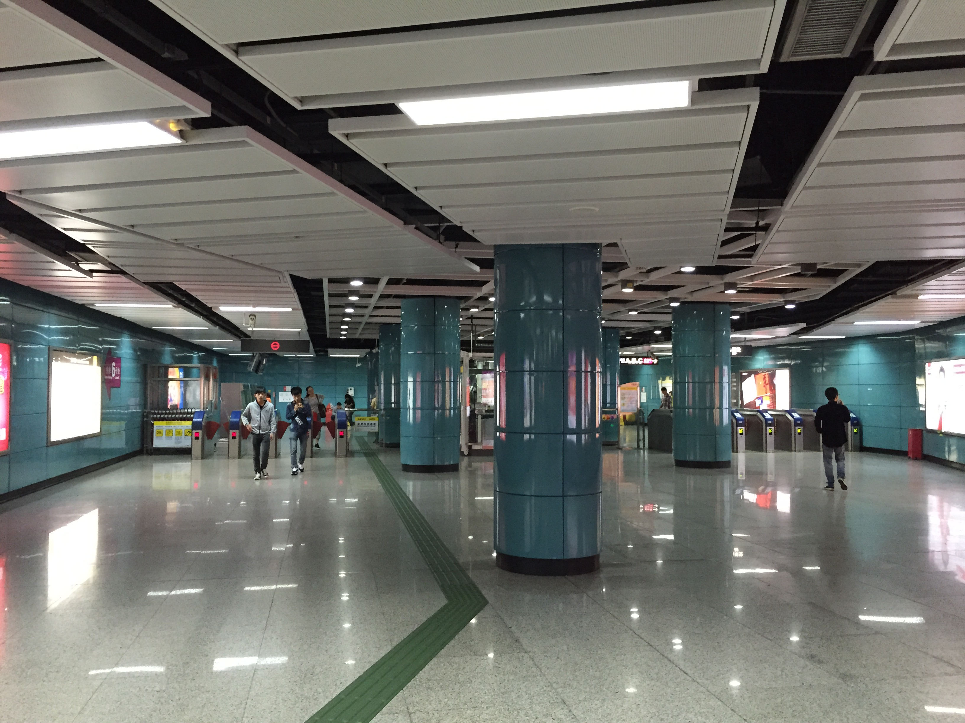 广州地铁区庄站地下一层站厅